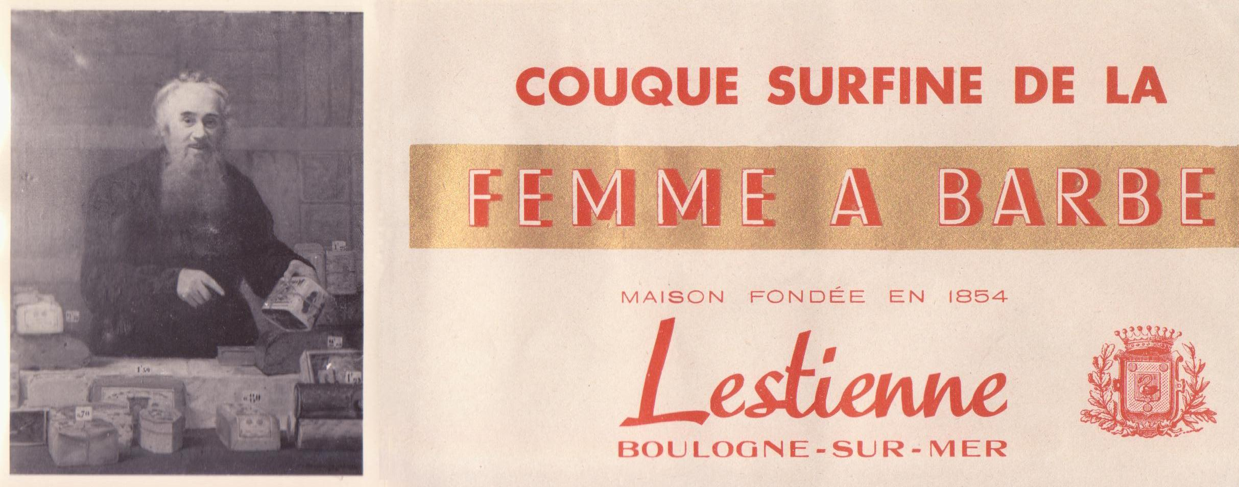 Clémence Lestienne, femme à barbe et vendeuse de pain d'épices